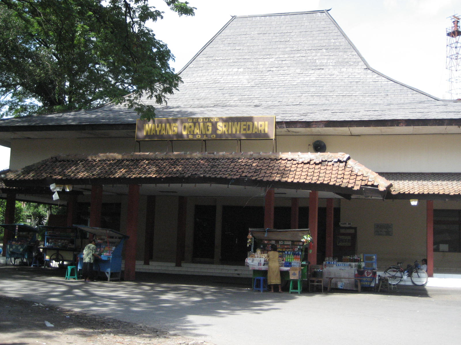 Gedung Wayang Orang Sriwedari